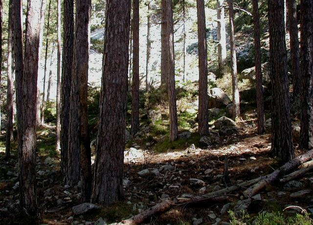 Pinus nigra var. corsicana (syn. P. laricio)